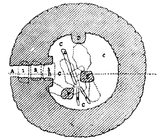 Grundriss des östlichen Talayots in Sant Agusti, Menorca